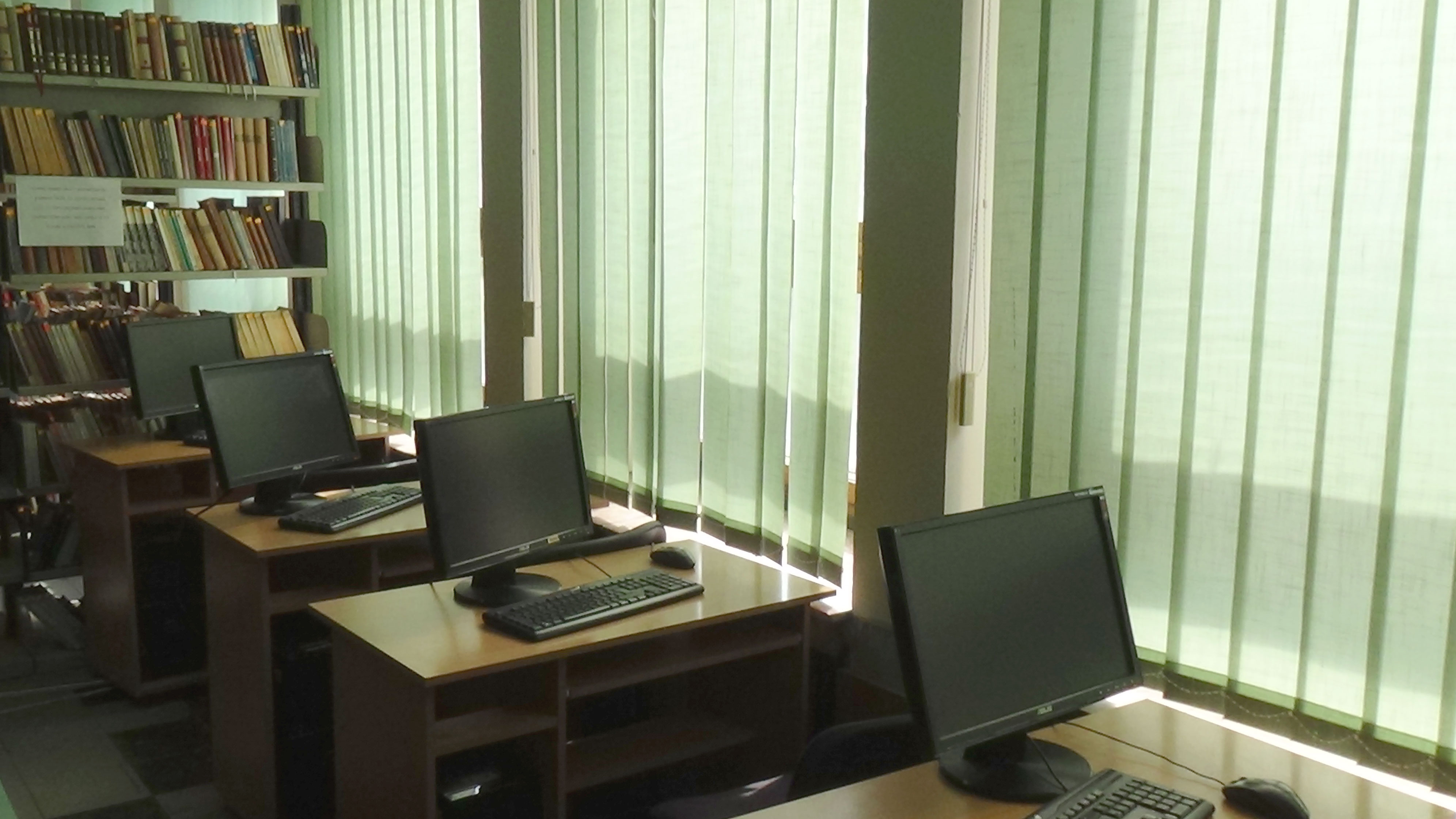 Elektronska čitaonica bibiloteke Kruševac.